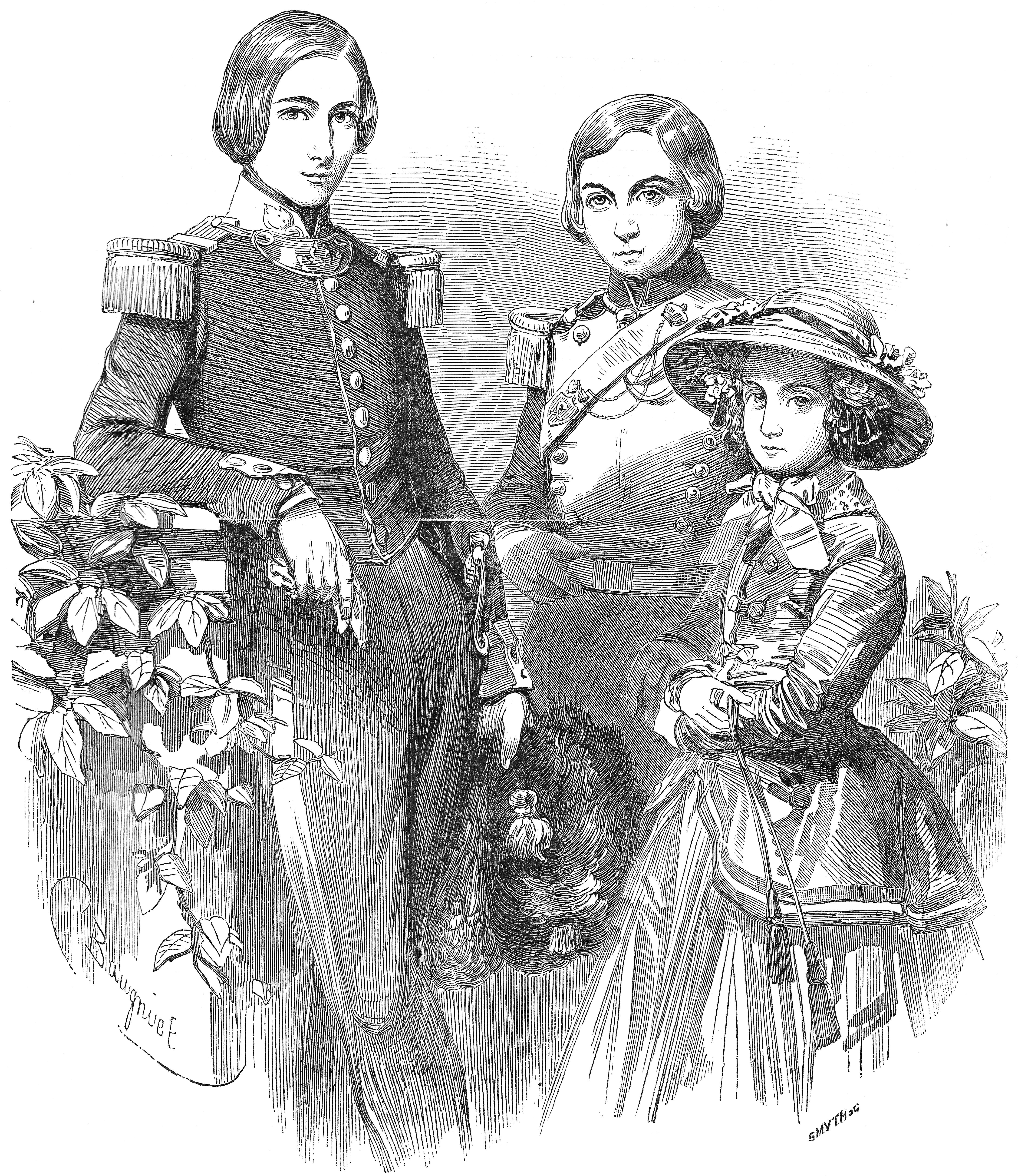 La princesse Charlotte de Belgique et ses deux frères. — De gauche à droite : le prince Léopold, duc de Brabant, futur roi Léopold II, en uniforme de sous-lieutenant des Grenadiers ; le prince Philippe, comte de Flandre, en uniforme de sous-lieutenant des Guides ; la princesse Charlotte, future impératrice du Mexique. Uniforme de Grenadier : tunique et pantalon bleu ; col et rayure du pantalon rouge. Uniforme de Guide : tunique et pantalon vert ; col vert avec passepoil rouge ; rayure du pantalon rouge ; plastron rouge sur le devant de la tunique.